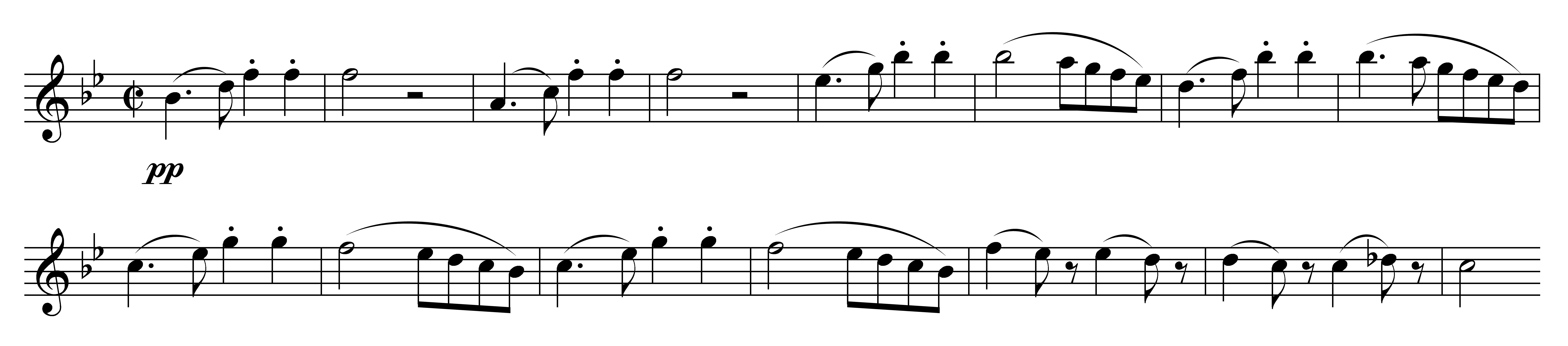 Notenbeispiel Schubert Sinfonie 5 - 1. Satz Hauptthema T. 5-19